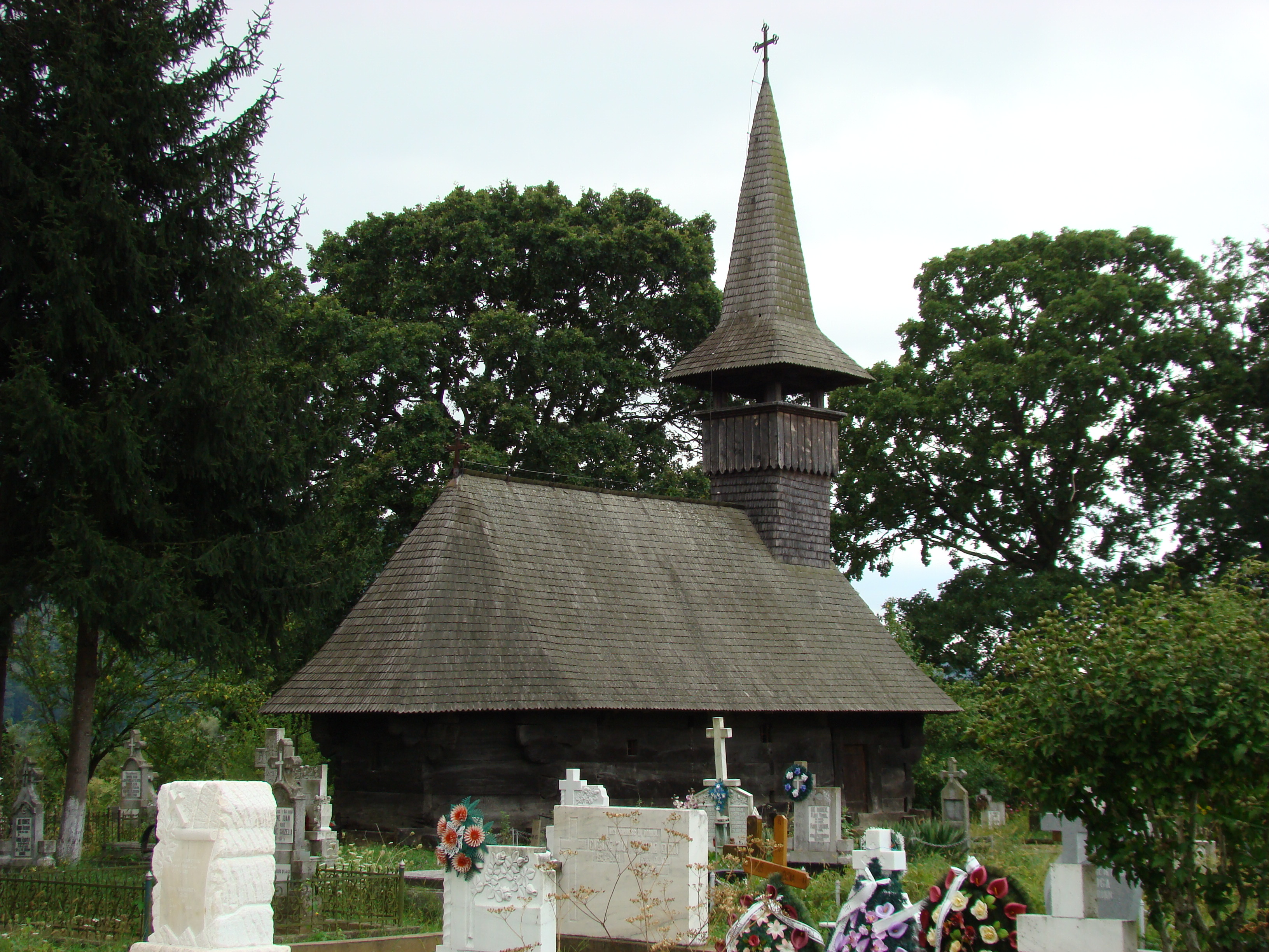 wooden Orthodox church in Bretea Mureșană, Romania